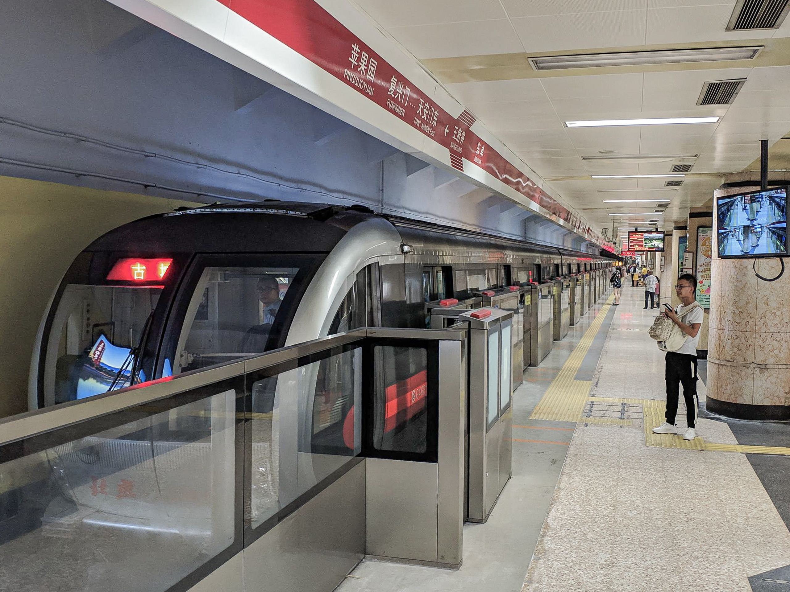 中文（中国大陆）: 北京地铁1号线王府井站停靠的列车